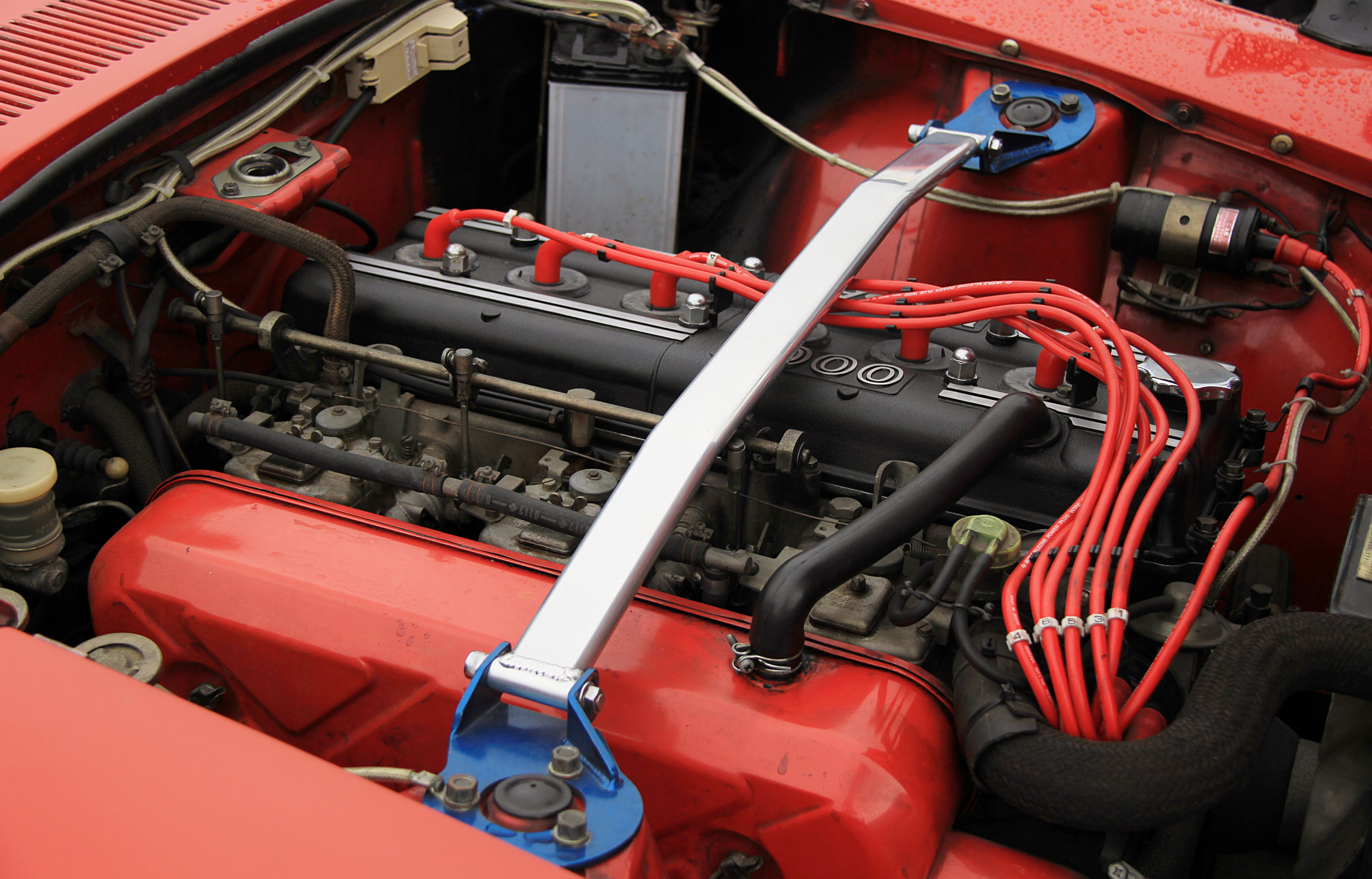 Nissan S20